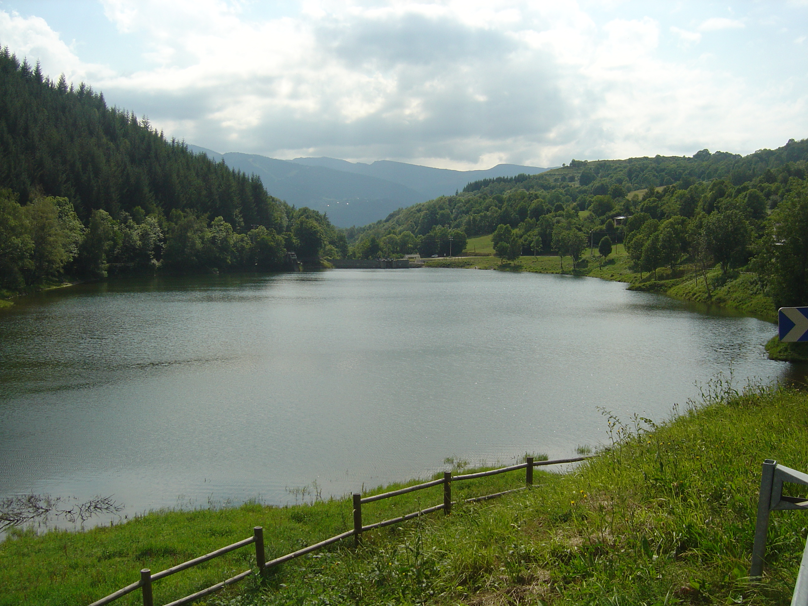 Ascou (Ariège, Midi-Pyrénées, France) - Étang de Goulours sur la route du col de Pailhères.